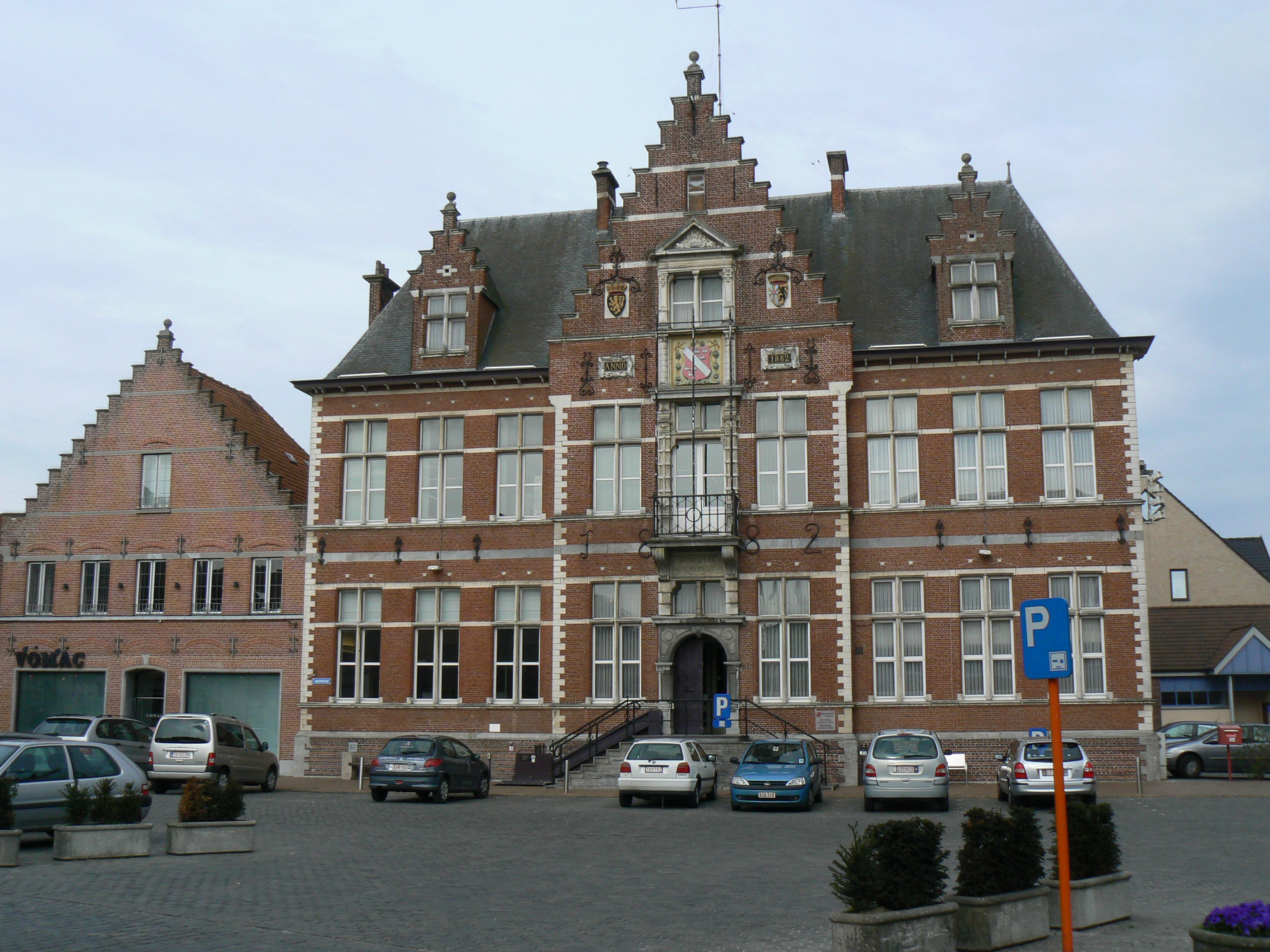 gemeentehuis Oostkamp